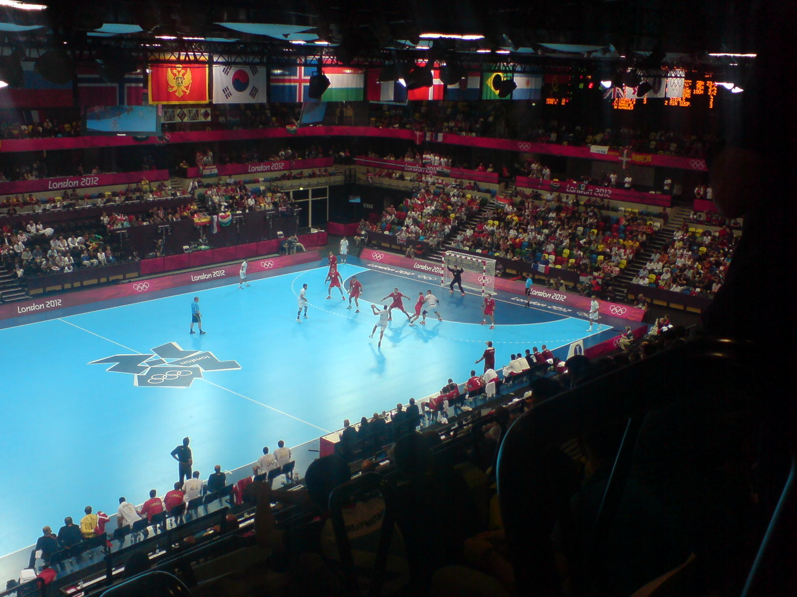 Handball - Spain vs Hungary